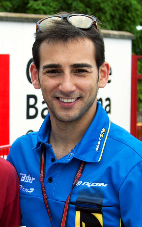 Ricky Cardús, piloto español de Moto2